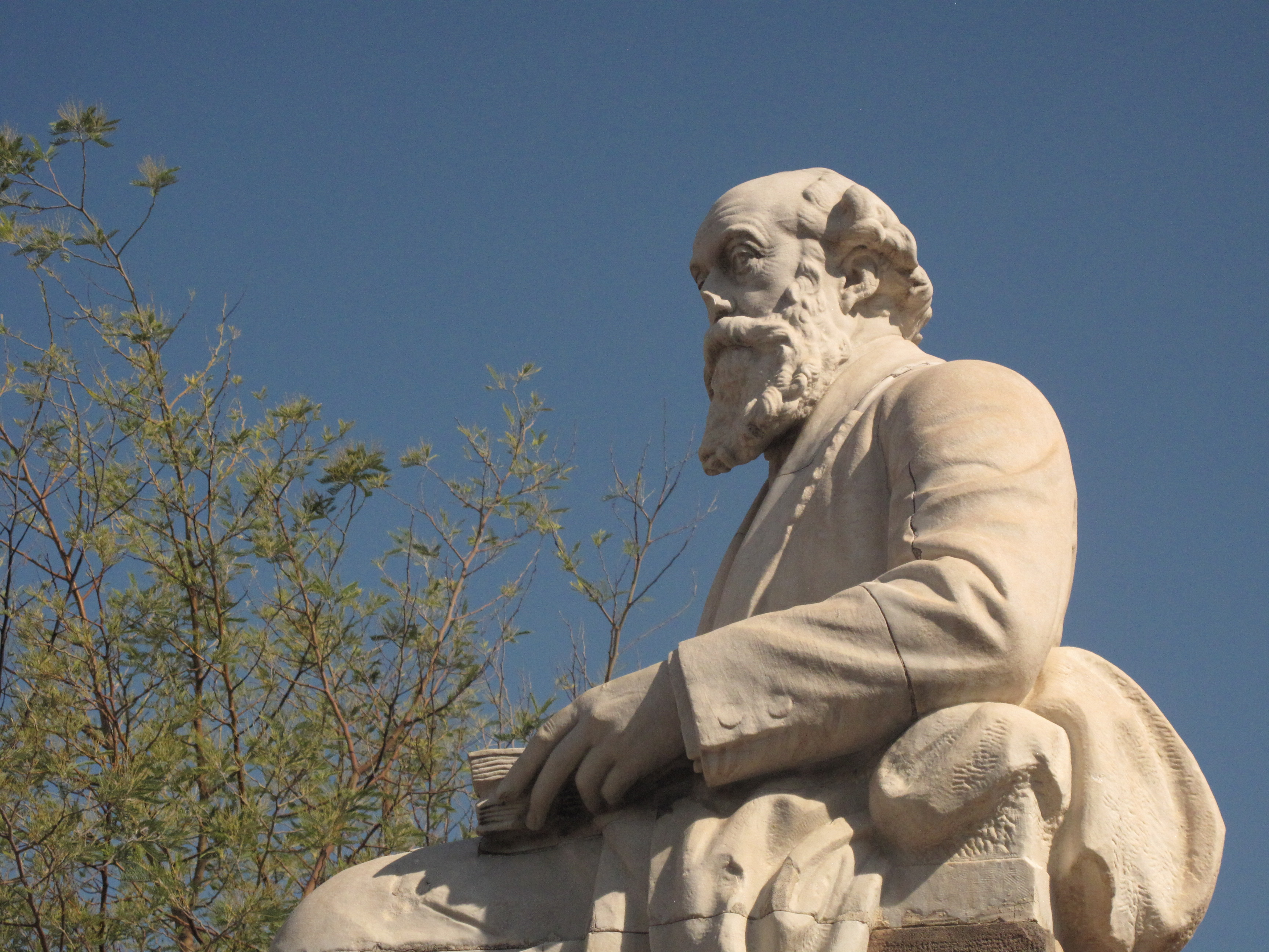 Monument a Eusebi Güell (Santa Coloma de Cervelló)